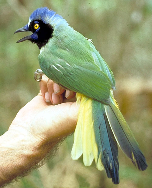 Green Jay Cyanocorax luxuosus